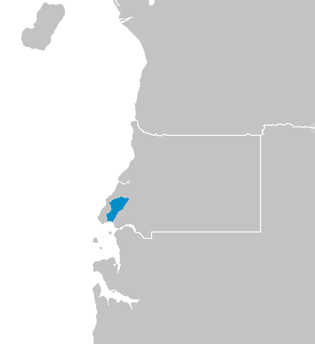 Idioma balengue